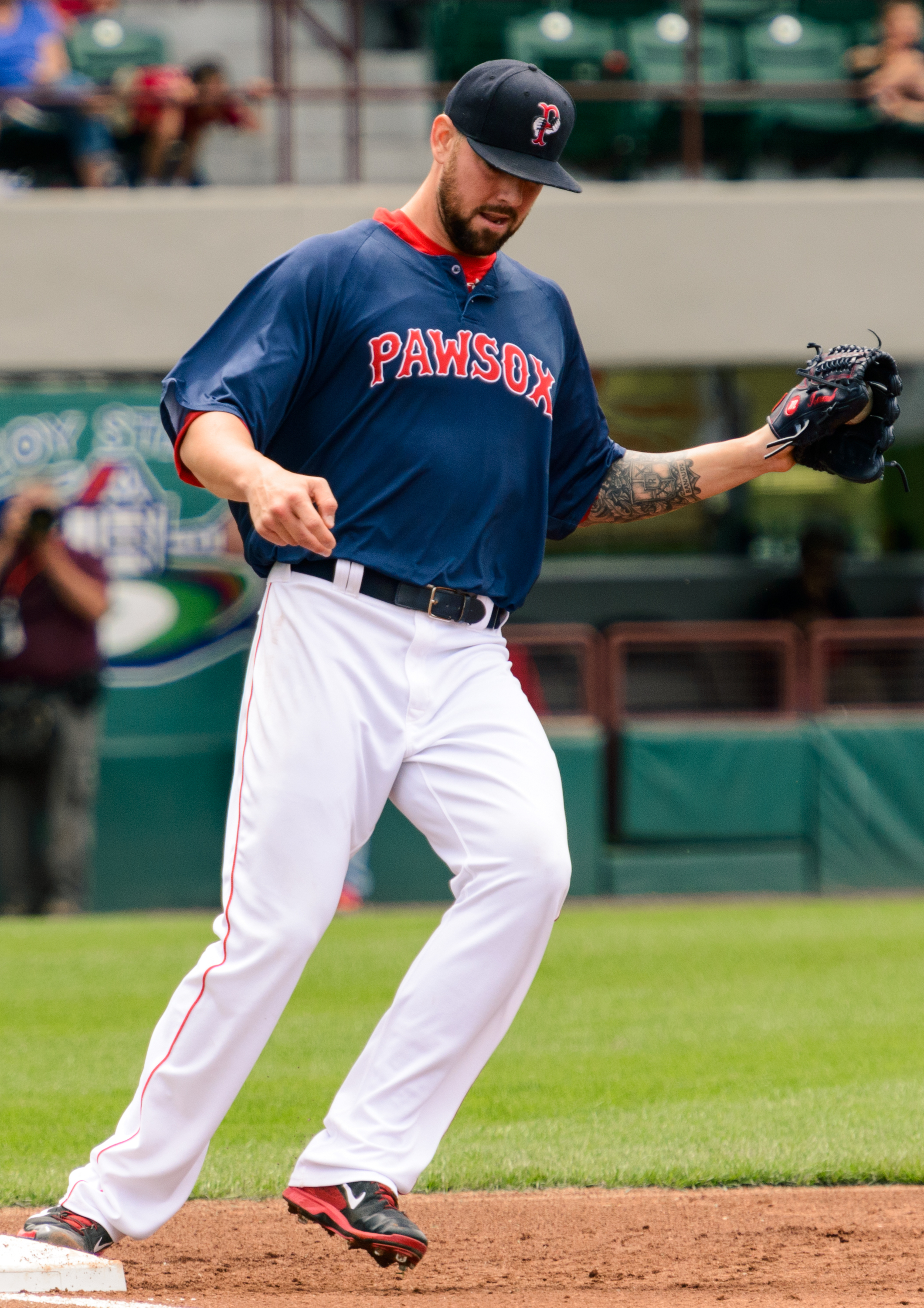 Anthony Ranaudo